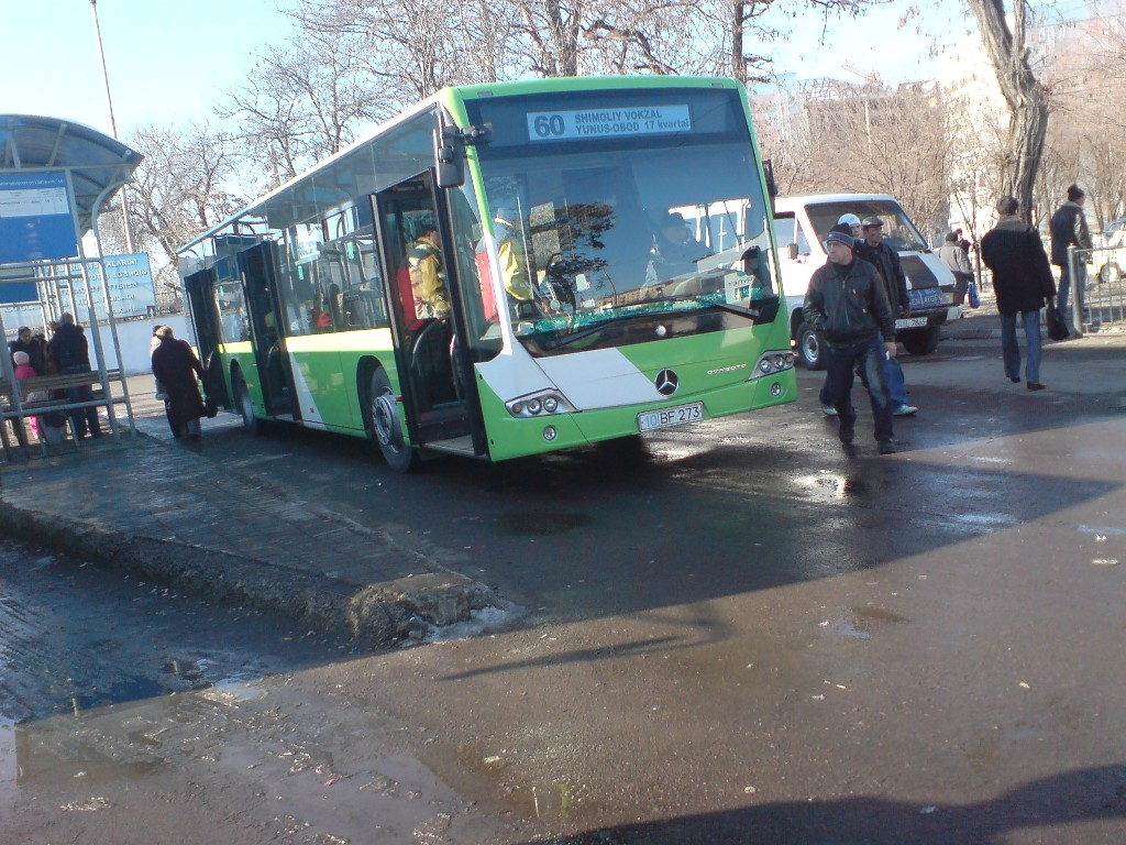 Автобус Mercedes Benz ( с 60 маршрутом "Северный вокзал - Юнус- Абад 17 квартал") на остановке "Северный вокзал"